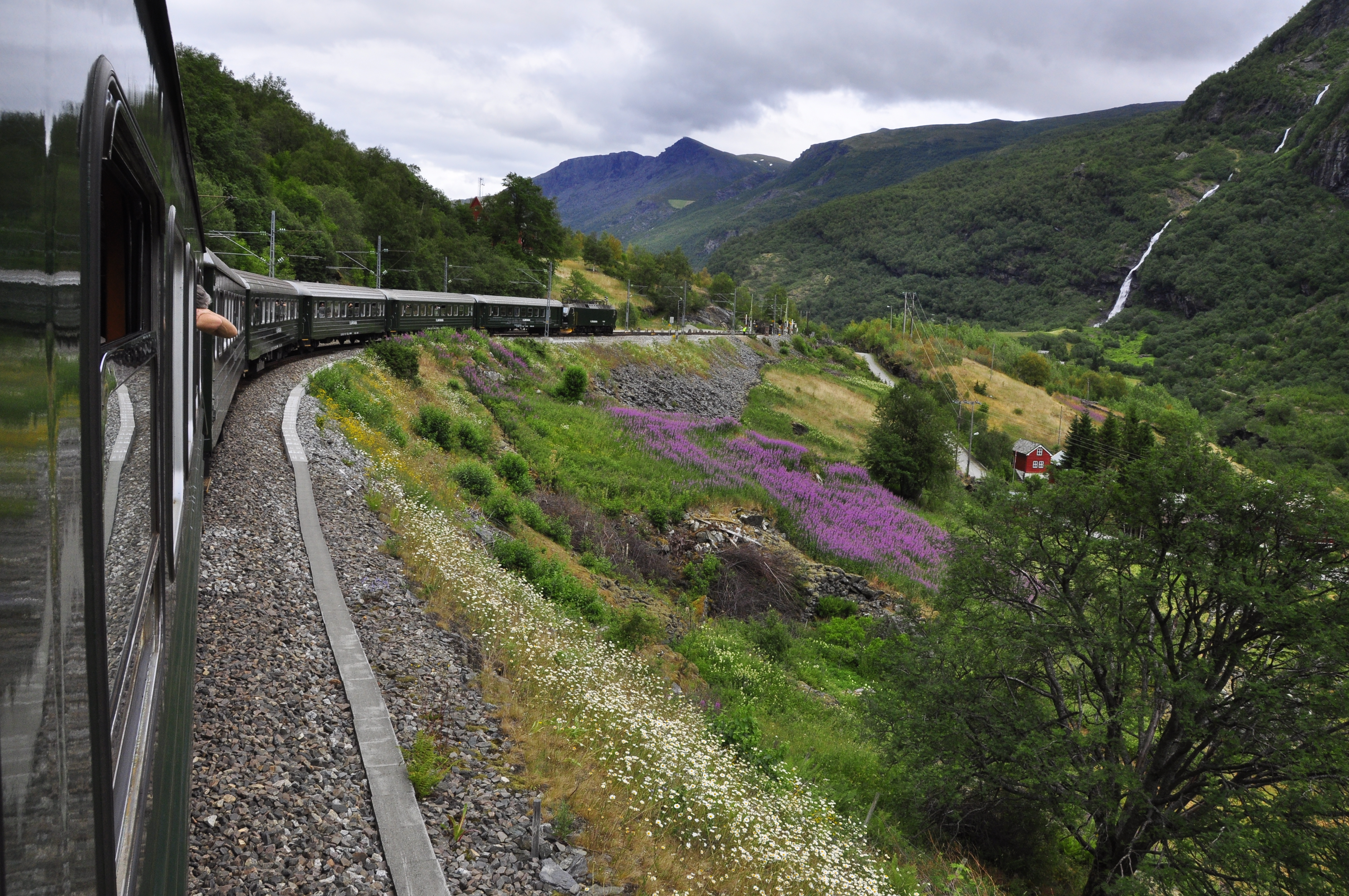 Flåmsbana ved Berekvam haldeplass